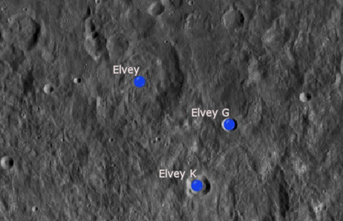 Cráter lunar Elvey. Cráteres satélite (Imagen LROC)